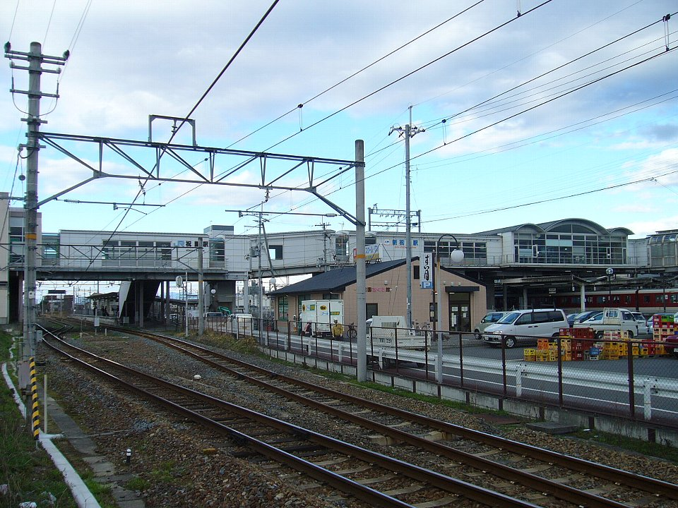 祝園駅構内を北望 近鉄新祝園駅への通路が右へ続く